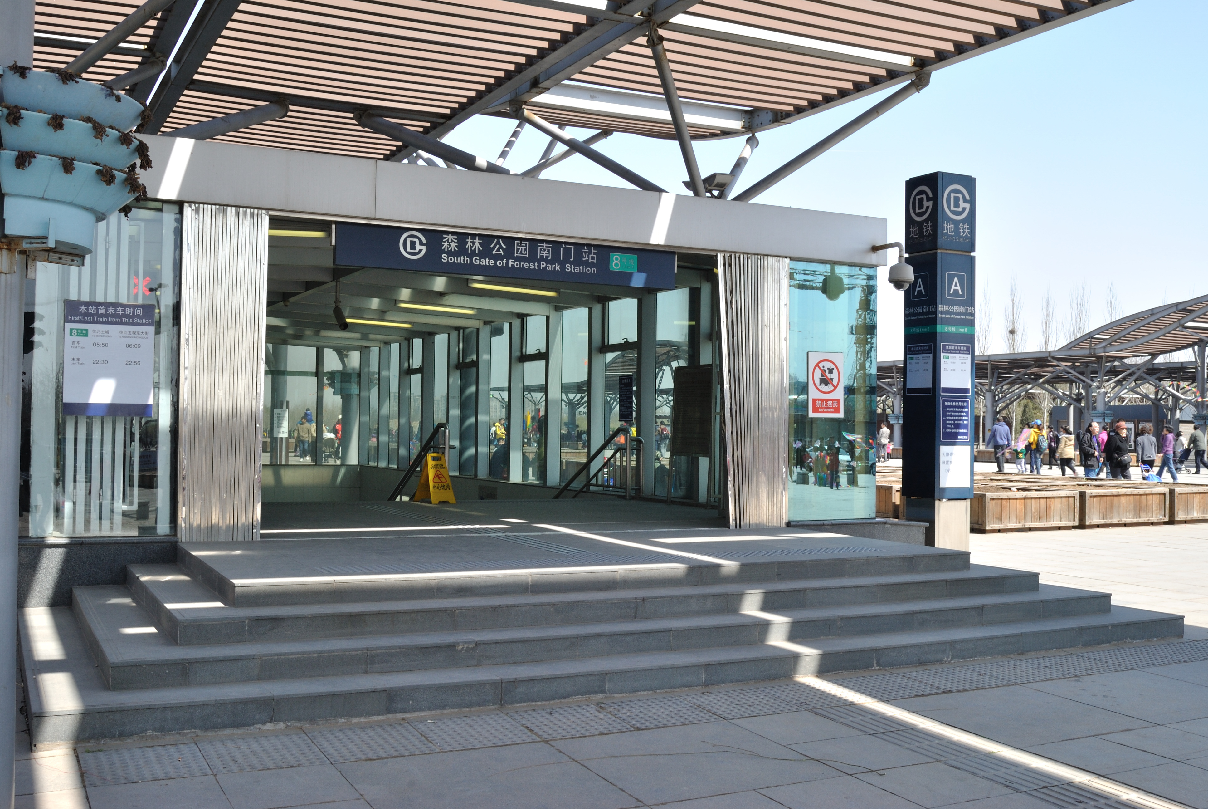 北京地铁森林公园南门站A出口